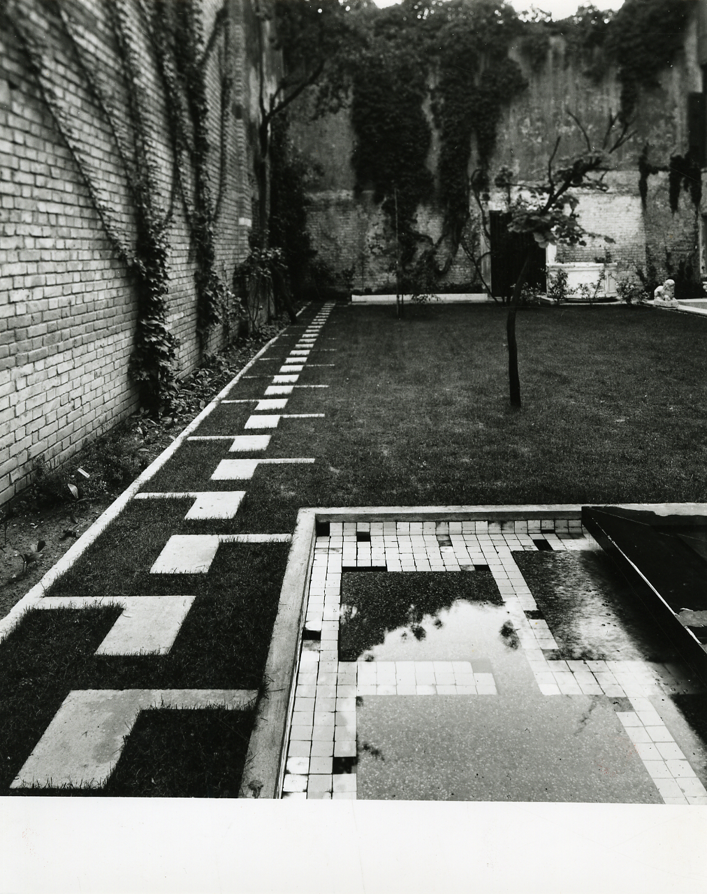 Venezia. Palazzo Querini Stampalia dopo l'intervento di Carlo Scarpa. Giardino. Servizio fotografico : Venezia, 1963 / Paolo Monti. - Stampe: 2 : Positivo b/n, gelatina bromuro d'argento/ carta, 24x30. - ((Al verso di una stampa manoscritto numero di negativo corrispondente: 7159. - Sul coperchio della scatola, manoscritto a pennarello: "Musei". - Occasione: Documentazione del restauro dell'architetto Carlo Scarpa realizzato sul pianterreno e il giardino della Fondazione Querini Stampalia di Venezia. - Fonte: Rubrica di Paolo Monti: Archivio 10x12 (ultimi numerati) - dal G1 al (s.d.), presso Archivio Paolo Monti